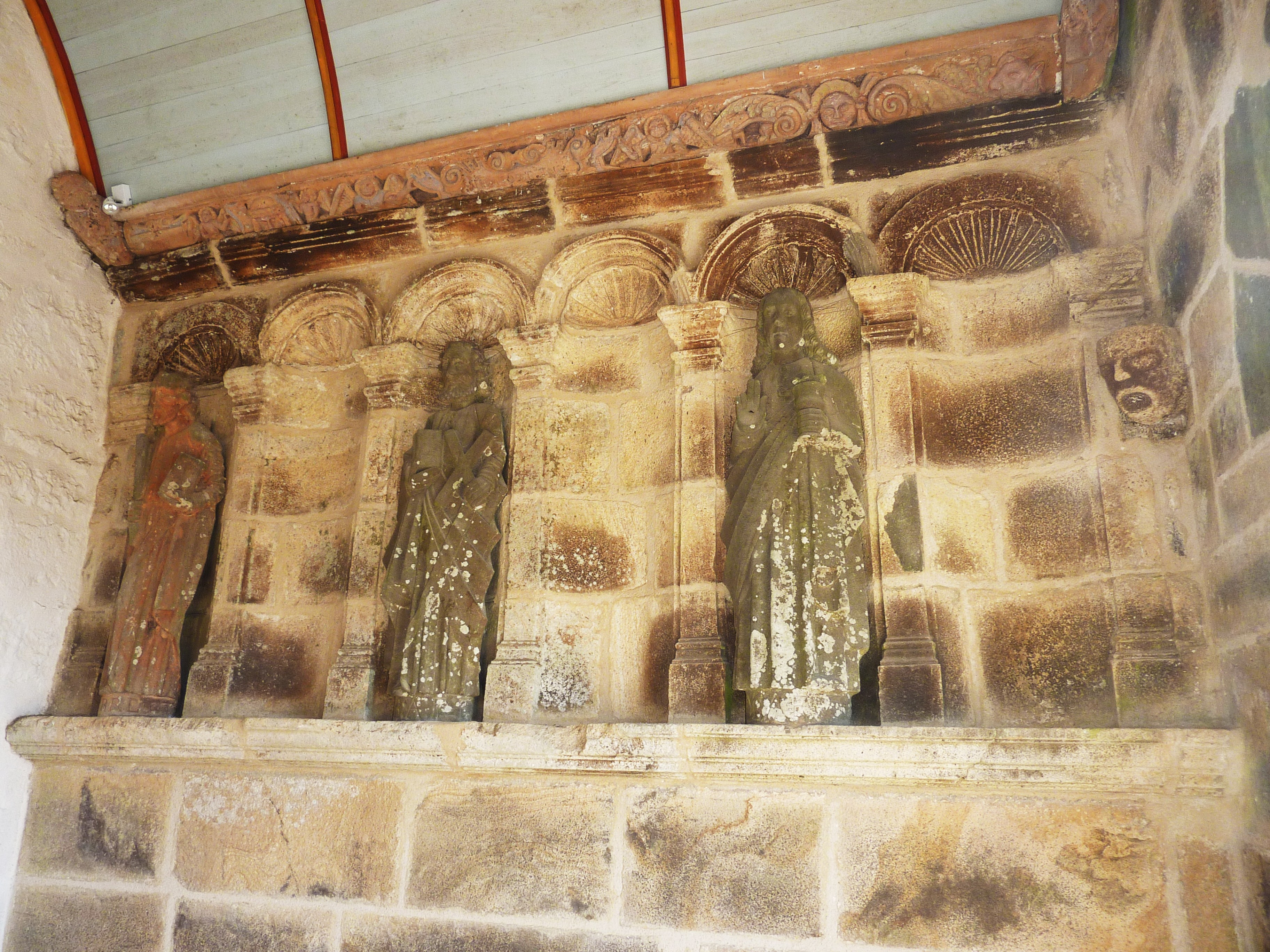 Le Tréhou : église paroissiale Sainte-Pitère, trois statues d'apôtres dans le porche: Saint-Pierre, Saint-André et Saint-Jean l'évangéliste.